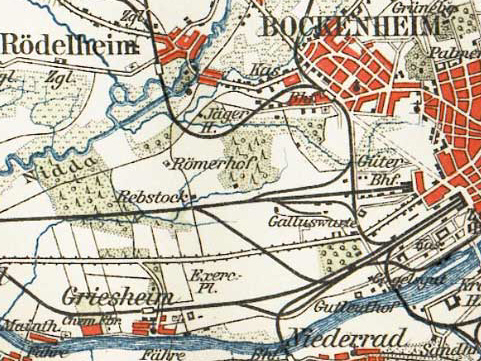 Frankfurt, 1893: Das Rebstockgelände um 1890. Zur Orientierung: Die Gleise im Norden, Westen und Süden bestehen heute noch so. Nördlich von Griesheim verläuft die Mainzer Landstrasse von Westen zur Galluswarte und weiter zur Innenstadt. Man erkennt das damalige Rödelheim, Bockenheim, Griesheim und Niederrad. Das heutige Gallus ist noch nicht vorhanden.